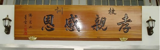 中文（台灣）: 孝親感恩牌匾